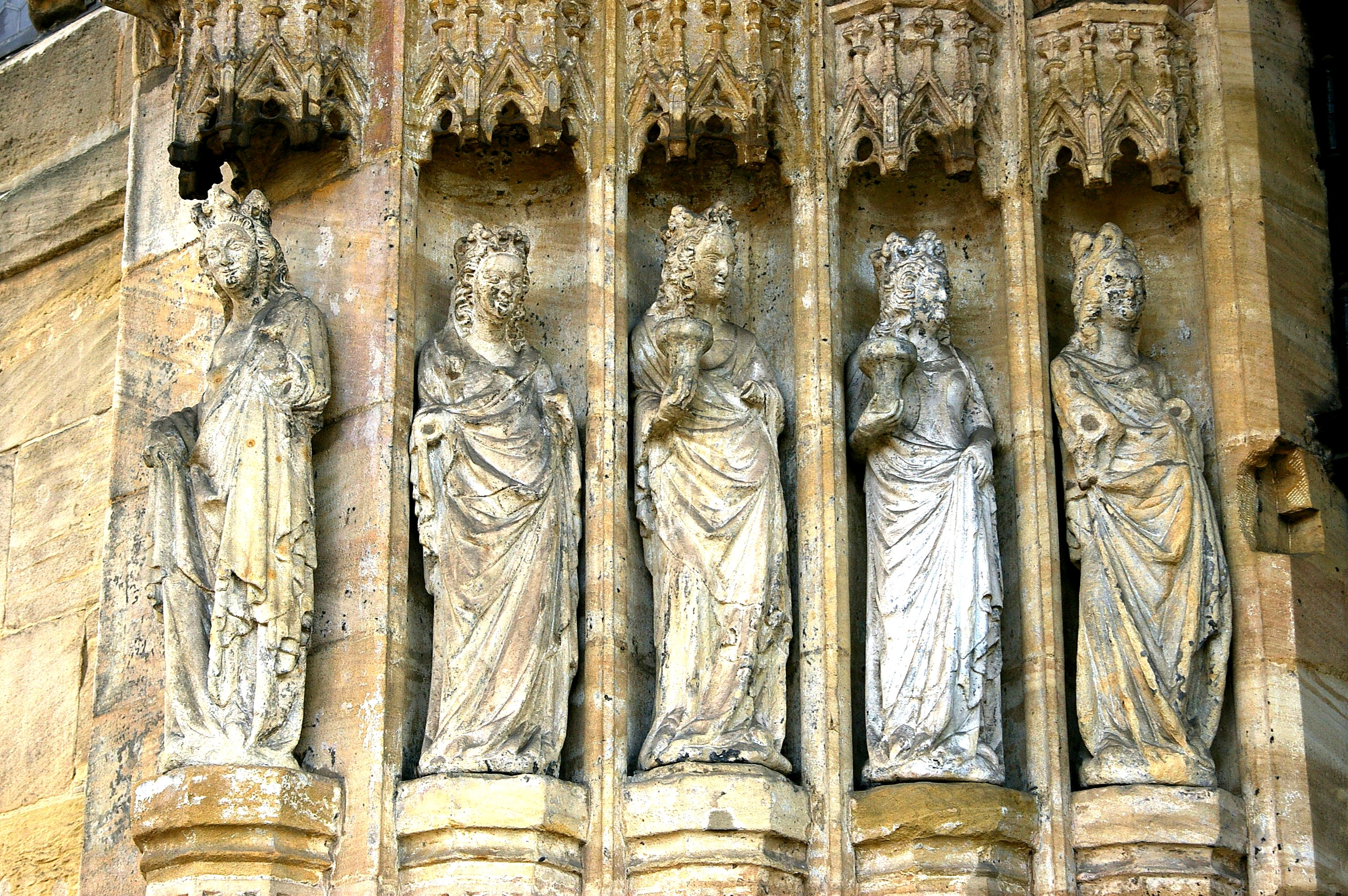 Bamberg - Obere Pfarre - Brautpforte, die klugen Jungfrauen (um 1380/90)